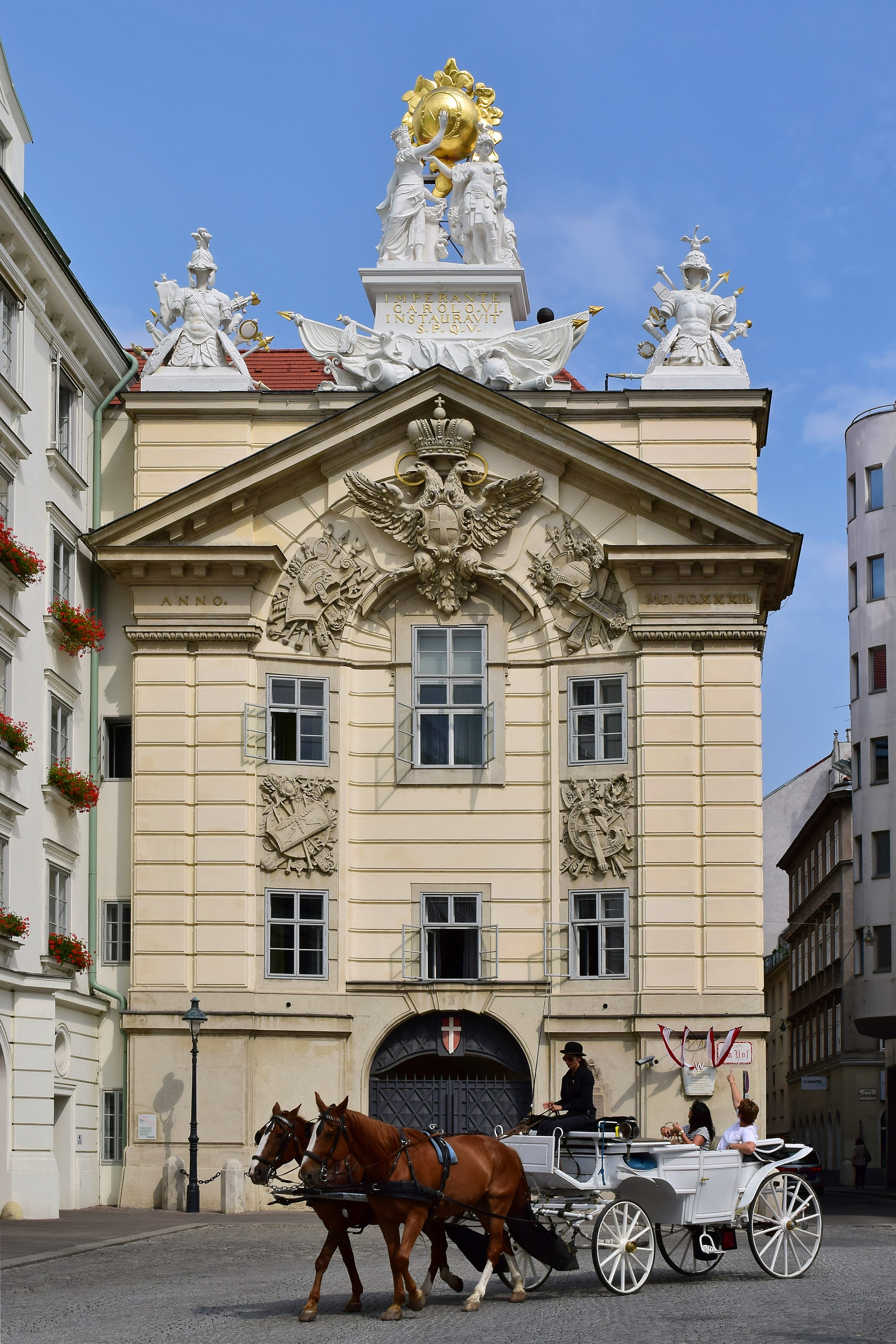 Ehem. Bürgerliches Zeughaus, Feuerwehrzentrale